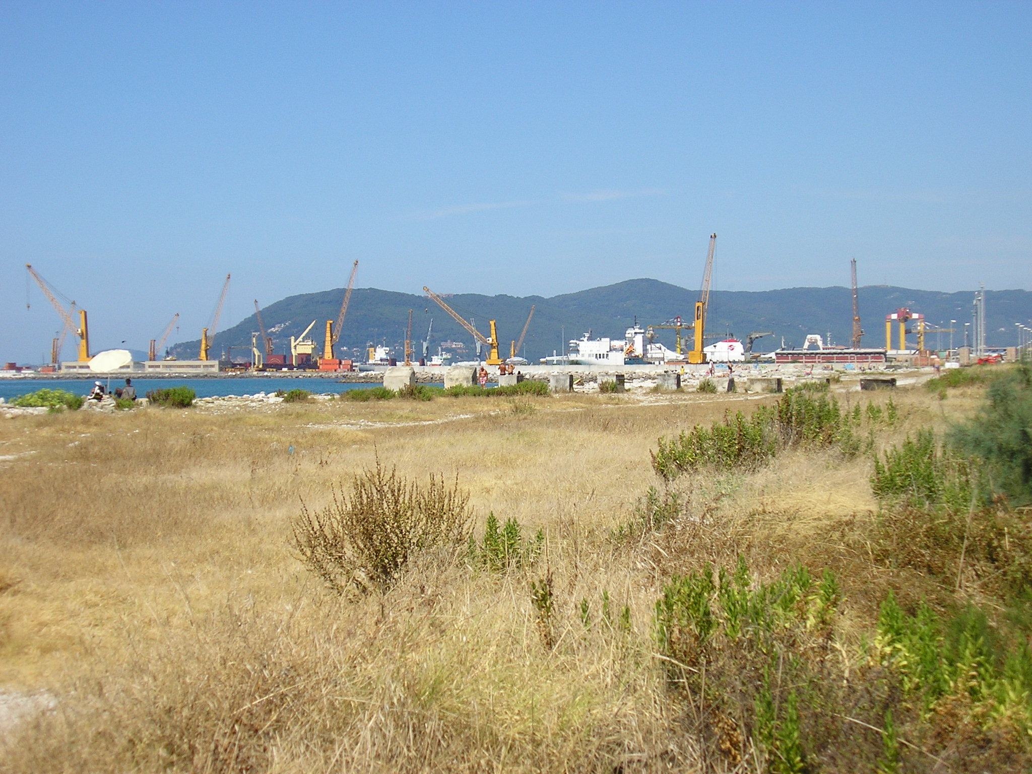 Porto di Marina di Carrara